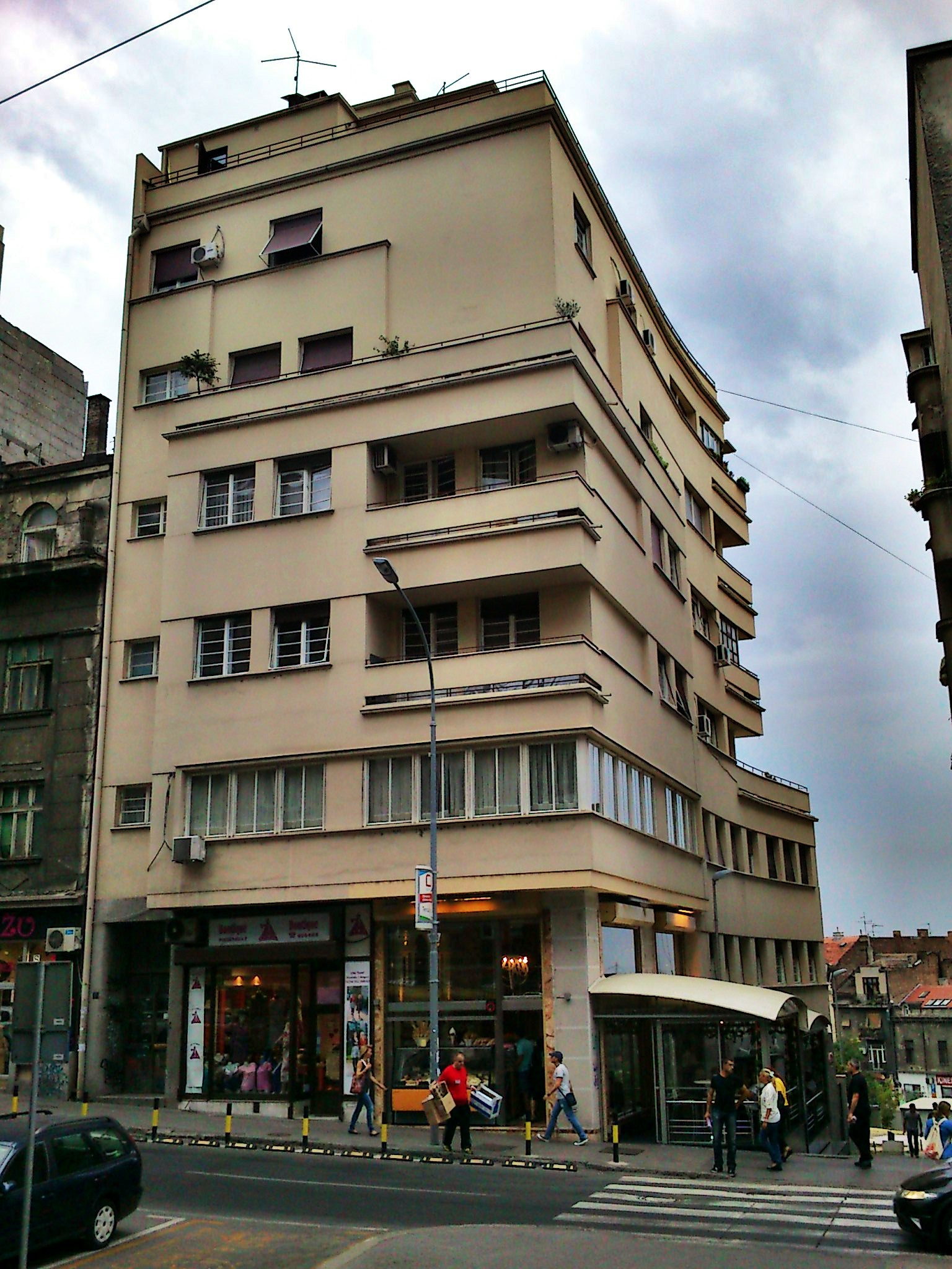 Кућа Здравка Ђурића